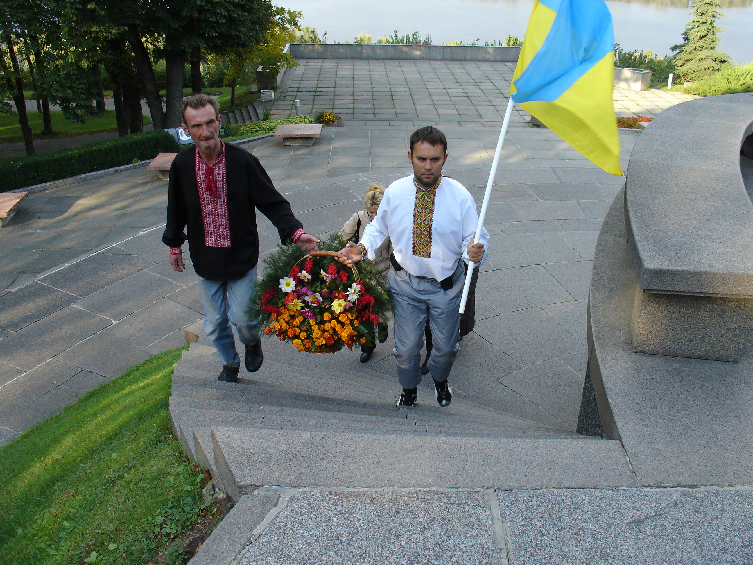 Тарасів дороговказ (2008) - Канів. Покладання квітів на могилу Кобзаря